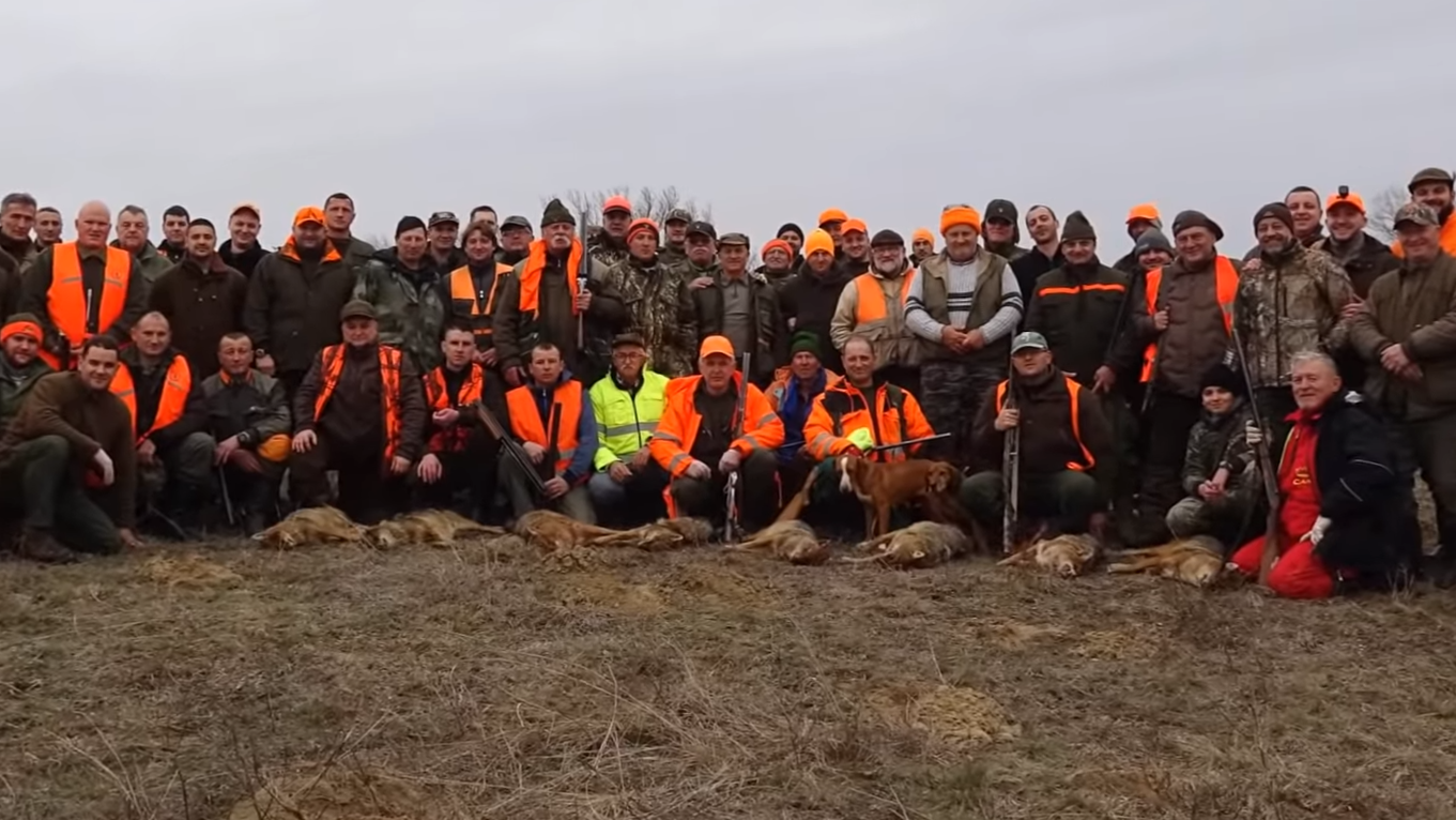 Februar mesec pogonskih lovova na predatore. Ove nedelje smo gostovali u lovištu "Mramorak", mladi ljudi sa odličnom vizijom i još boljom organizacijom. Svaka čast domaćinima na odličnom druženju i još boljem lovu. Do sledećeg viđenja!